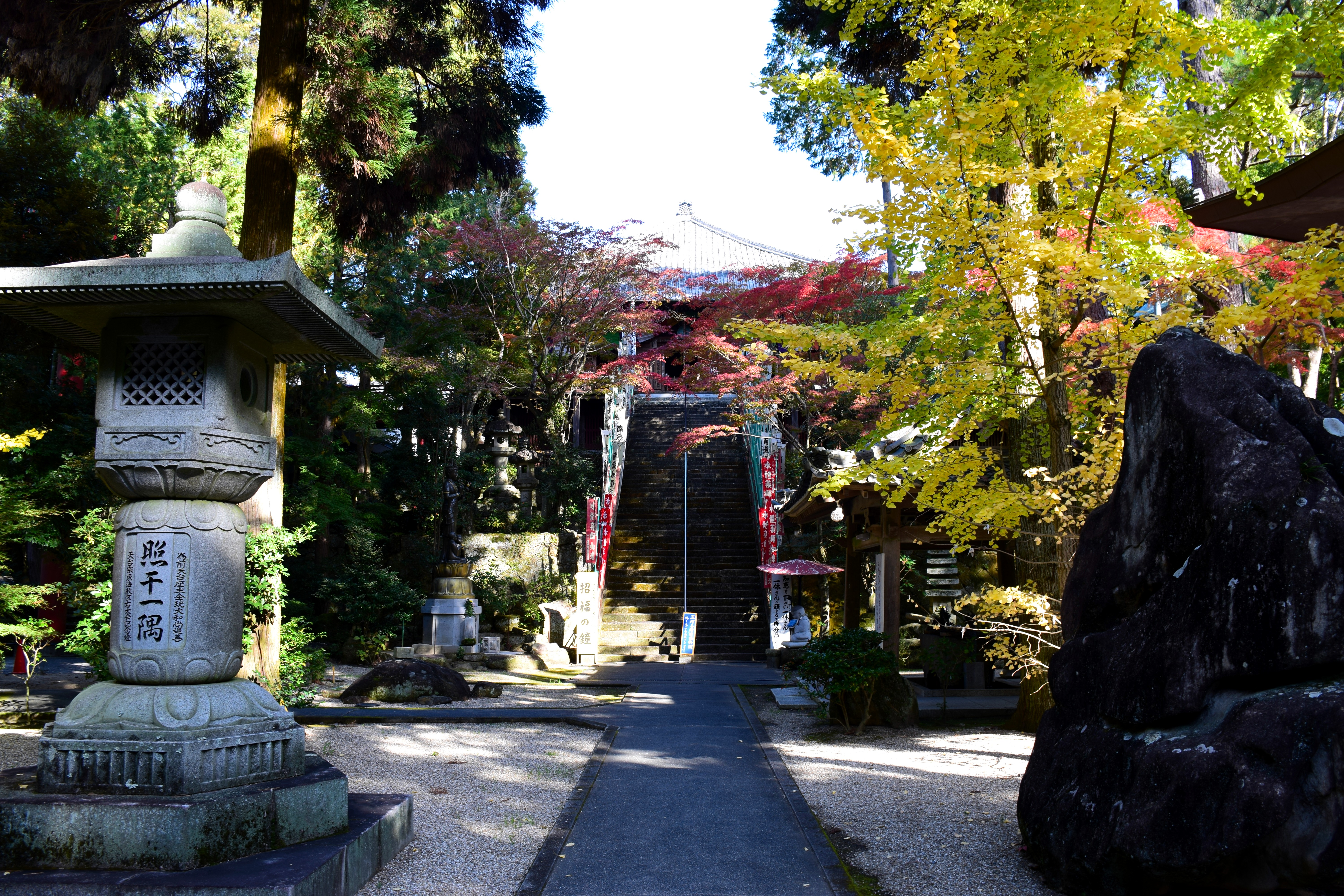 真福寺境内の紅葉